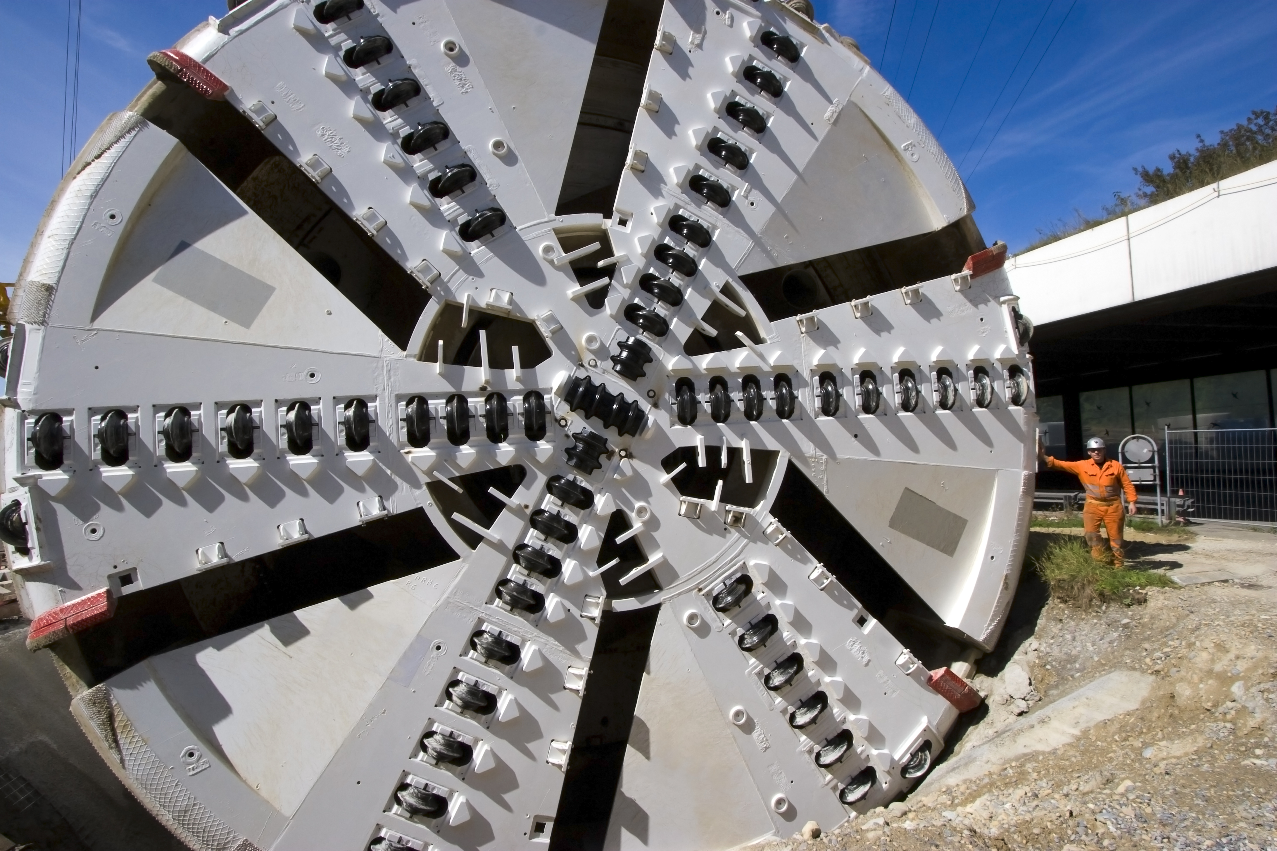 Bohrkopf einer Tunnelbohrmaschine, Pfändertunnel, 2008